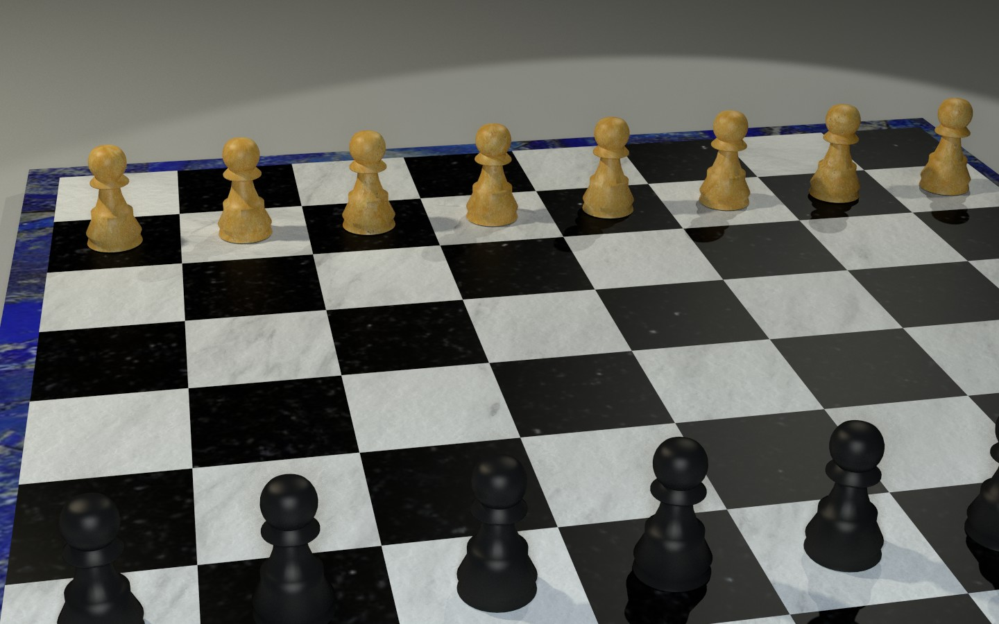 Schaakspel met alleen pionnen in de uitgangspositie. Gemaakt met Blender en YafRay.